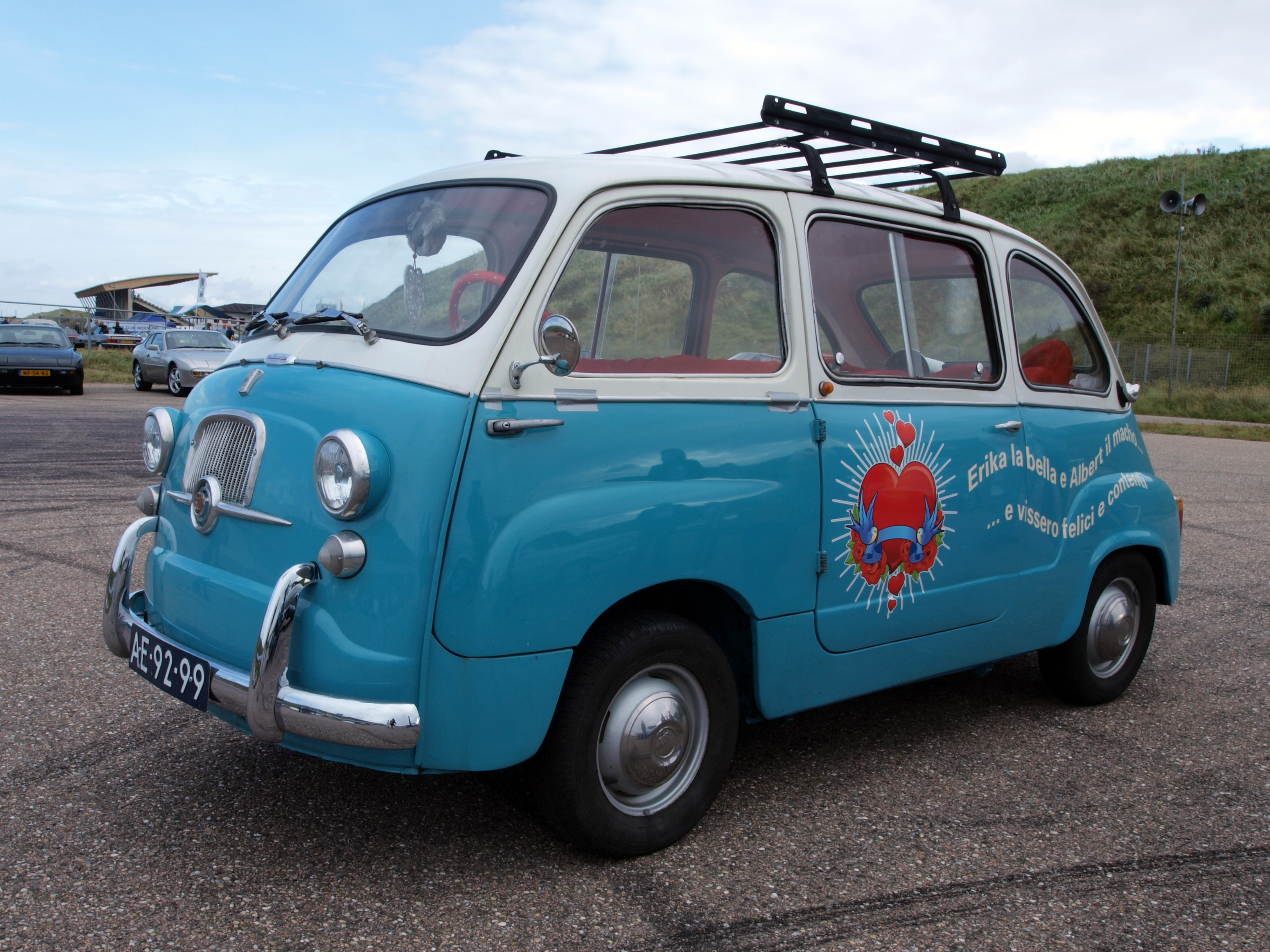 Nationaal Oldtimer Festival Zandvoort 2011.